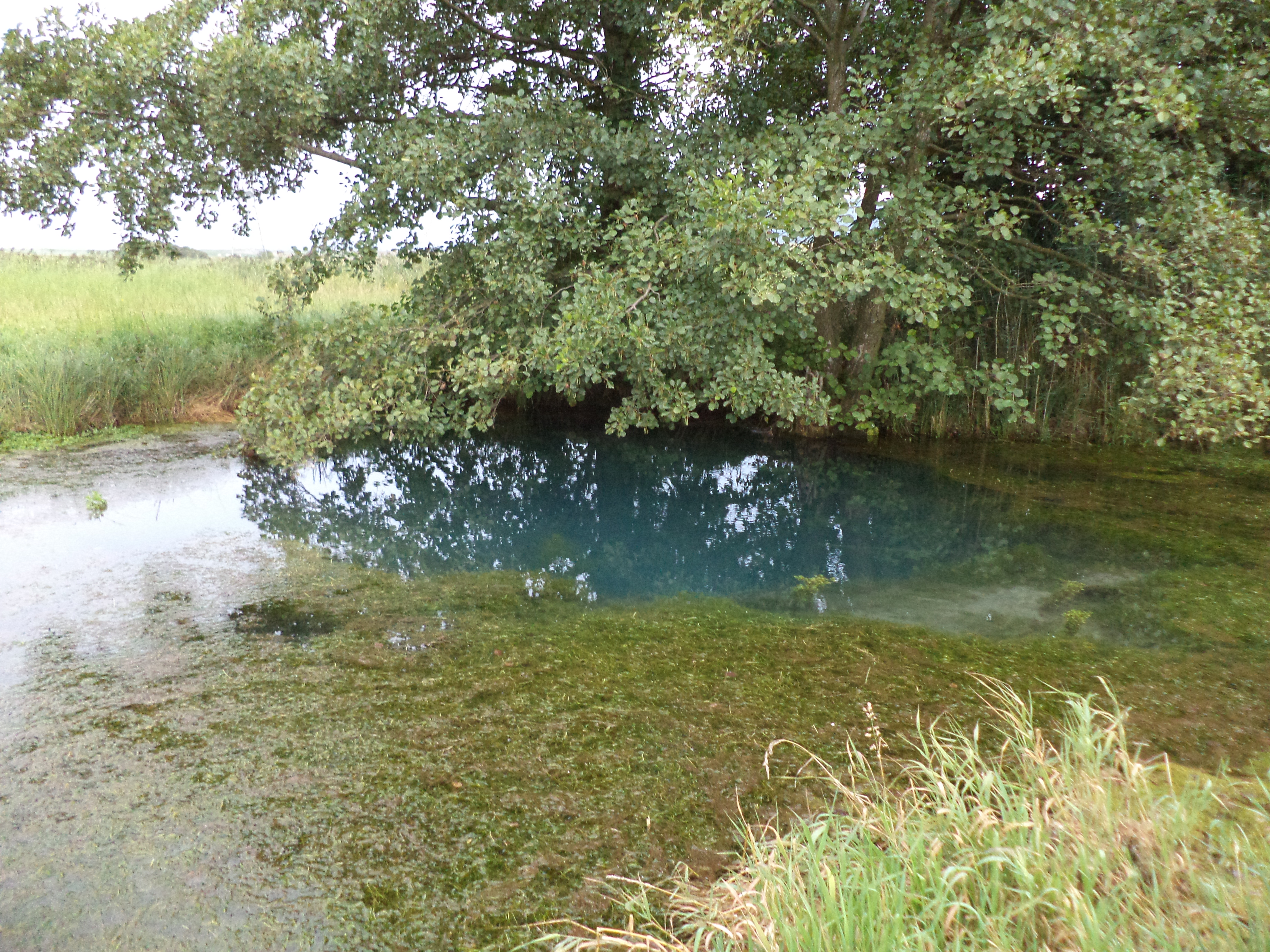 Das Gründleinsloch bei Castell in Unterfranken